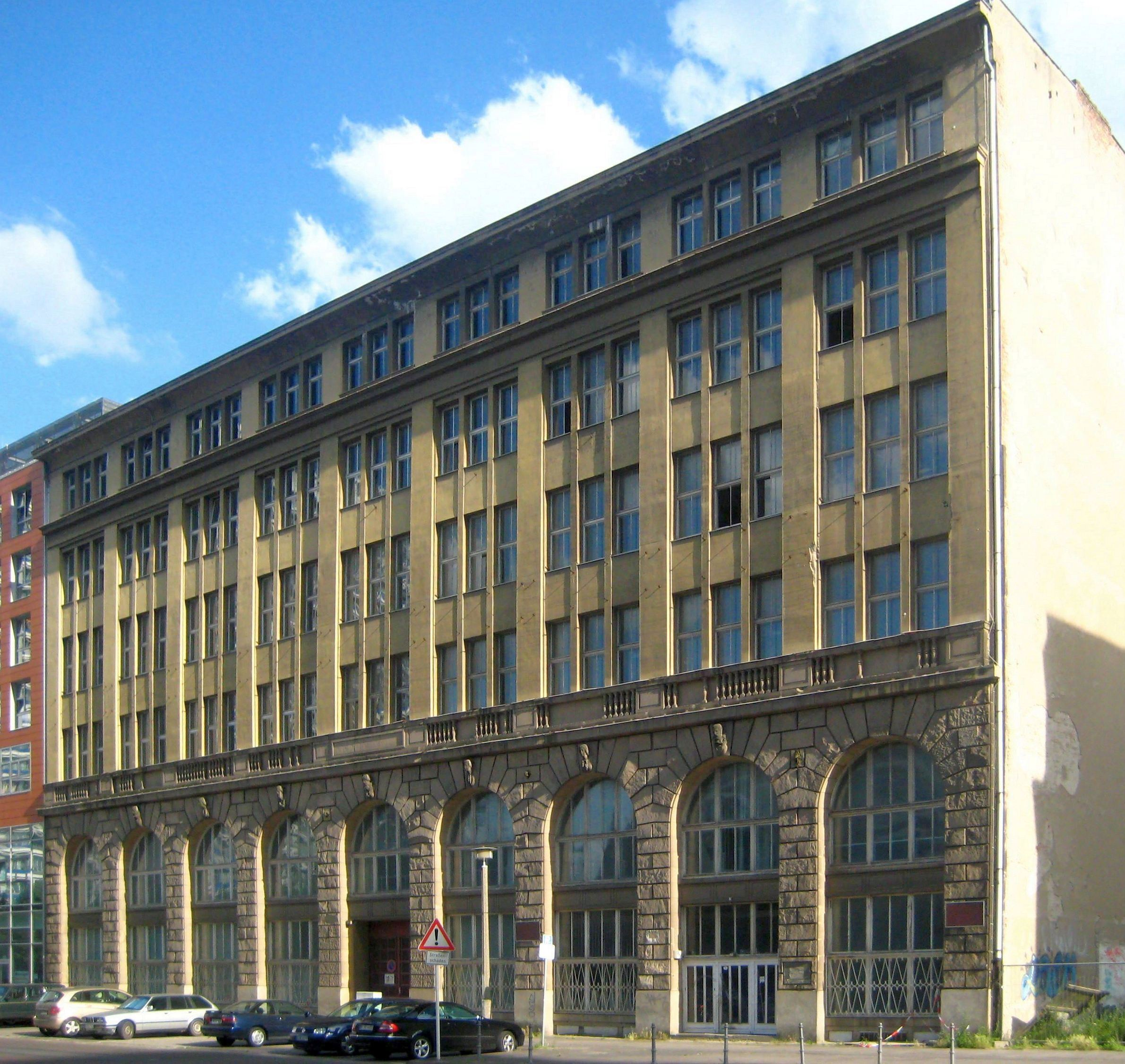 Der "Krausenhof" in der Krausenstraße 38-39 in Berlin-Mitte, hier die Fassade am ehemaligen Dönhoffplatz. Der große Komplex mit einem weiteren Vorderhaus an der parallel verlaufenden Schützenstraße (Nr. 40-45) mit ähnlichem Fassadenaufbau entstand 1911 nach einem Entwurf der Architekten Hermann Dernburg und Albert Bohm. Das Gebäude war gemäß vieler Geschäftshäuser der Zeit variabel nutzbar für Läden, Büros, Produktionsstätten oder Lager. Die Fassade ist traditionell und zeigt eine typische zweigeschossige Bogenstellung aus rustiziertem Sandstein, hier mit den Köpfen historischer Kaufleute auf den Schlusssteinen. Nach schweren Schäden im Zweiten Weltkrieg wurde um 1950 die Sandversteinverkleidung der oberen Etagen durch Putz ersetzt, das Gebäude um ein Stockwerk aufgestockt und das Innere komplett verändert. Zunächst saßen hauptsächlich Textilfirmen in dem Gebäude, später die für das Viertel um Schützenstraße und Zimmerstraße typischen Presseunternehmen. Seit Mitte der 1920er-Jahre gehörte das Gebäude dem Unternehmer Alfred Hugenberg, dessen Universum Film AG (Ufa) es als Hauptverwaltung nutzte. Später war das Gebäude kurzzeitig Sitz der Hauptverwaltung der DEFA, danach der Akademie der Landwirtschaftswissenschaften der DDR. Zwischen 1996 und 2003 saß hier das Landesdenkmalamt. Das Gebäude ist als Baudenkmal gelistet.